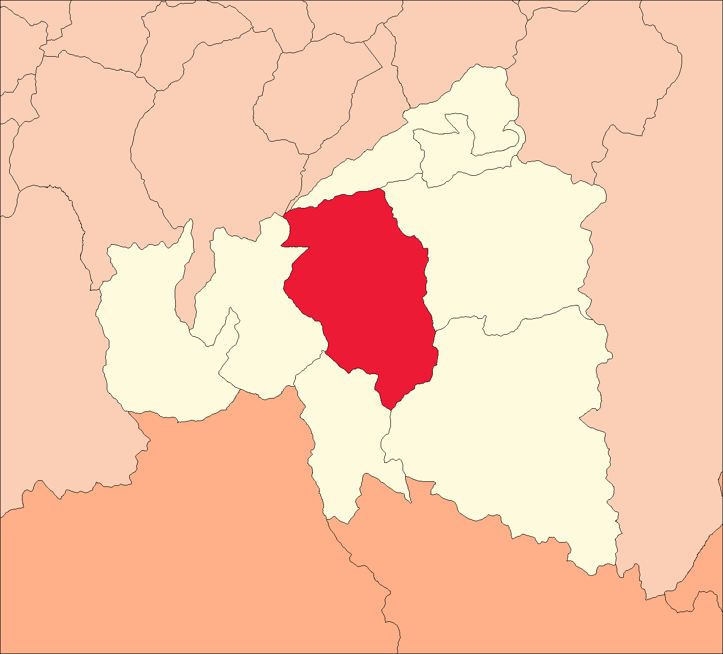 Área del distrito de Huácar.